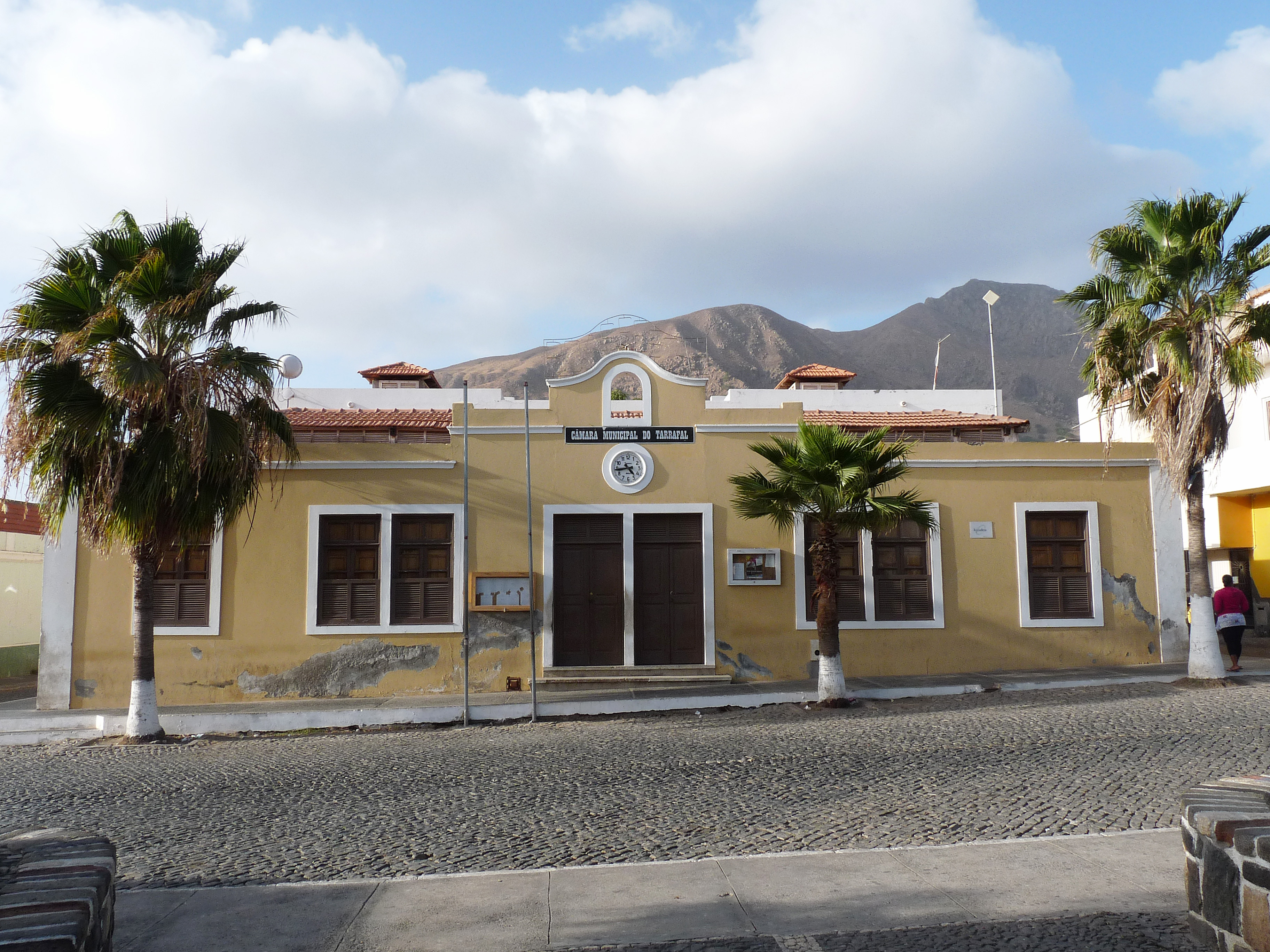 Tarrafal (île de Santiago, Cap-Vert) : Câmara Municipal